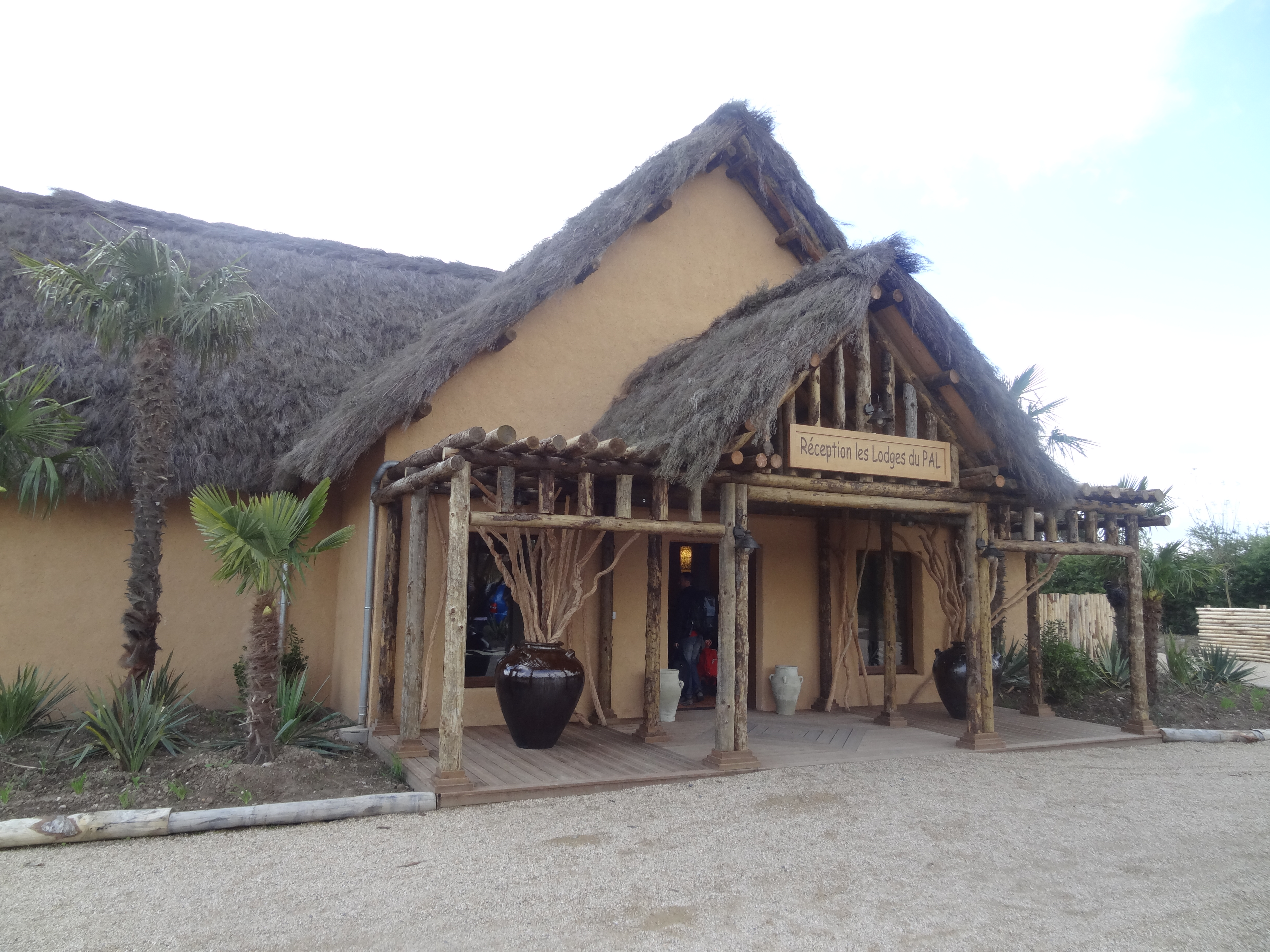 Réception des Lodges du PAL